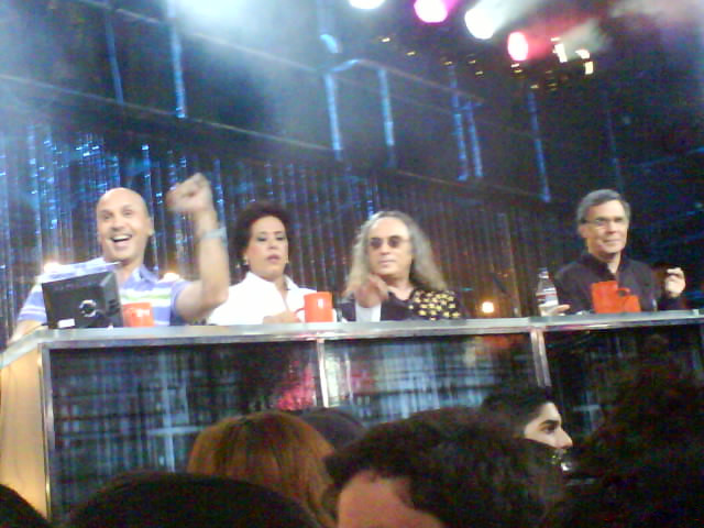 שופטי כוכב נולד